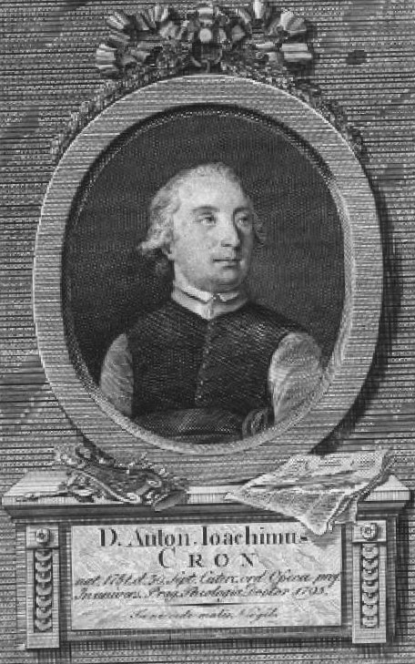 Joachim Antonín Cron, římskokatolický duchovní, osecký cisterciák a hudební skladatel